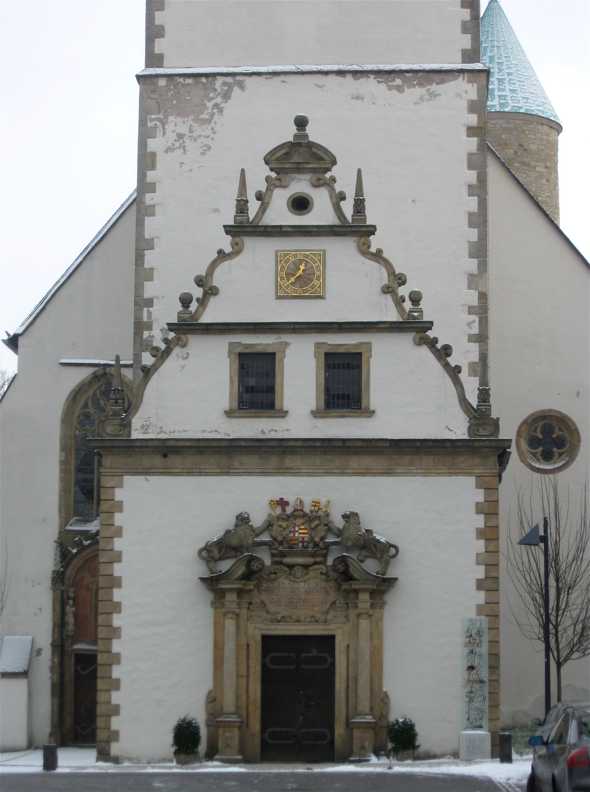 Busdorfkirche, Paderborn